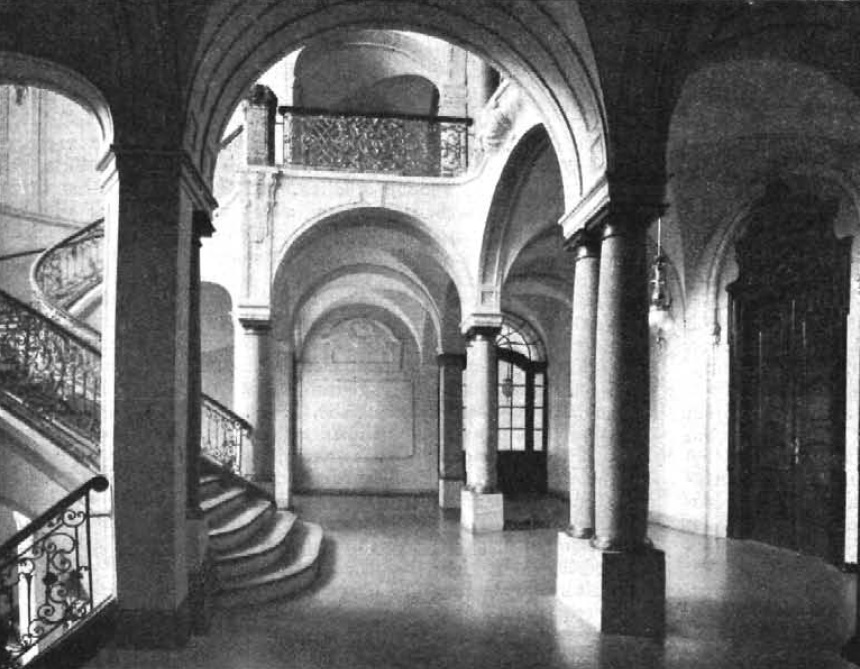 Regierungsgebäude Frankfurt (Oder) 1906 Haupttreppenhaus Obergeschoss